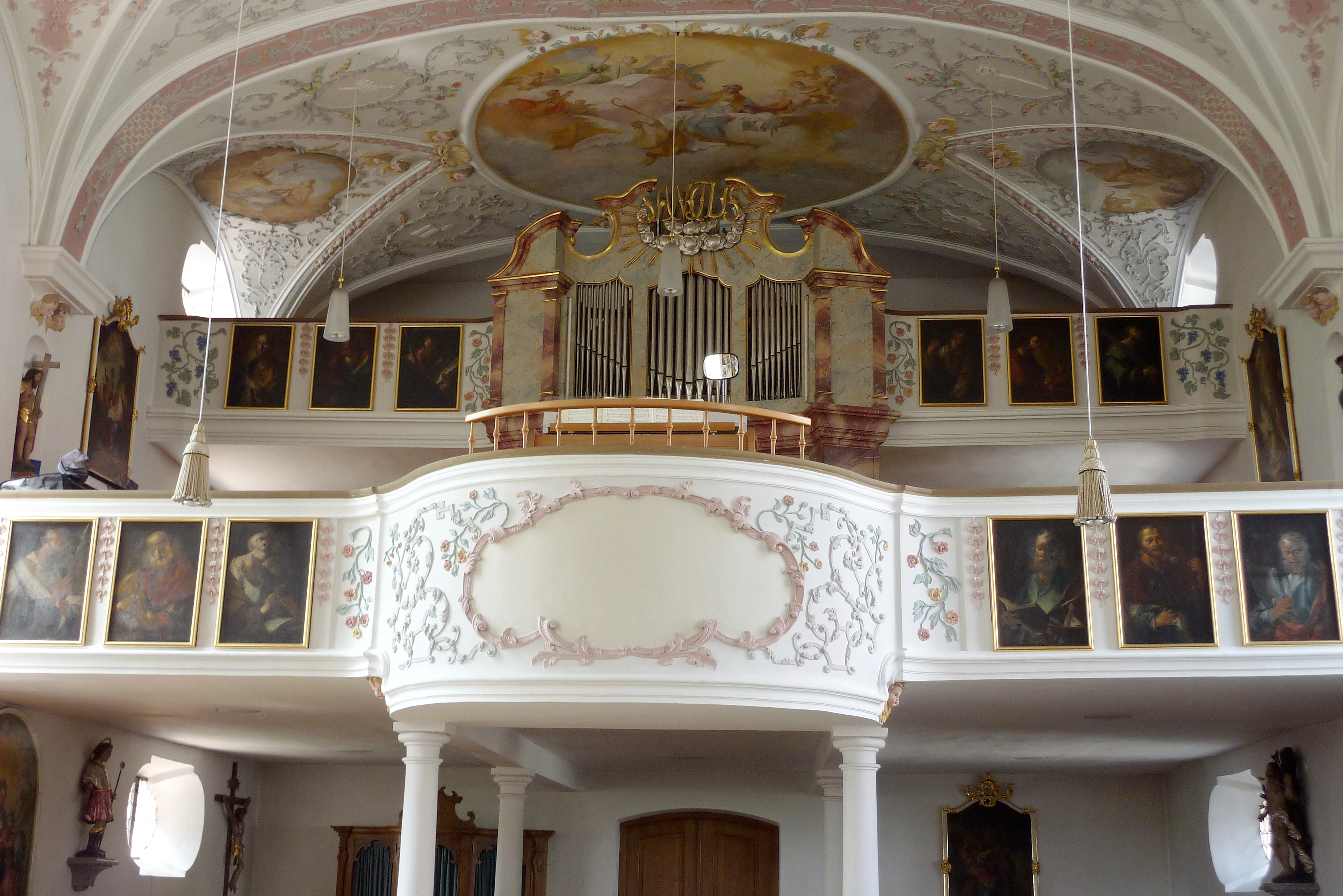 Katholische Pfarrkirche St. Martin in Horgau, einer Gemeinde im Landkreis Augsburg (Bayern), Orgelempore mit Brustbilder der zwölf Apostel, von J. G. Märkl (1756)